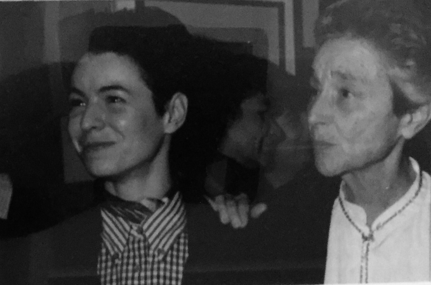 pendant le vernissage